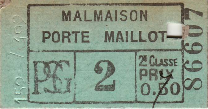 Iicket de tramway de la compagnie du Paris - Saint-Germain, oblitéré en 1921 pour le trajet Malmaison - Porte-Maillot